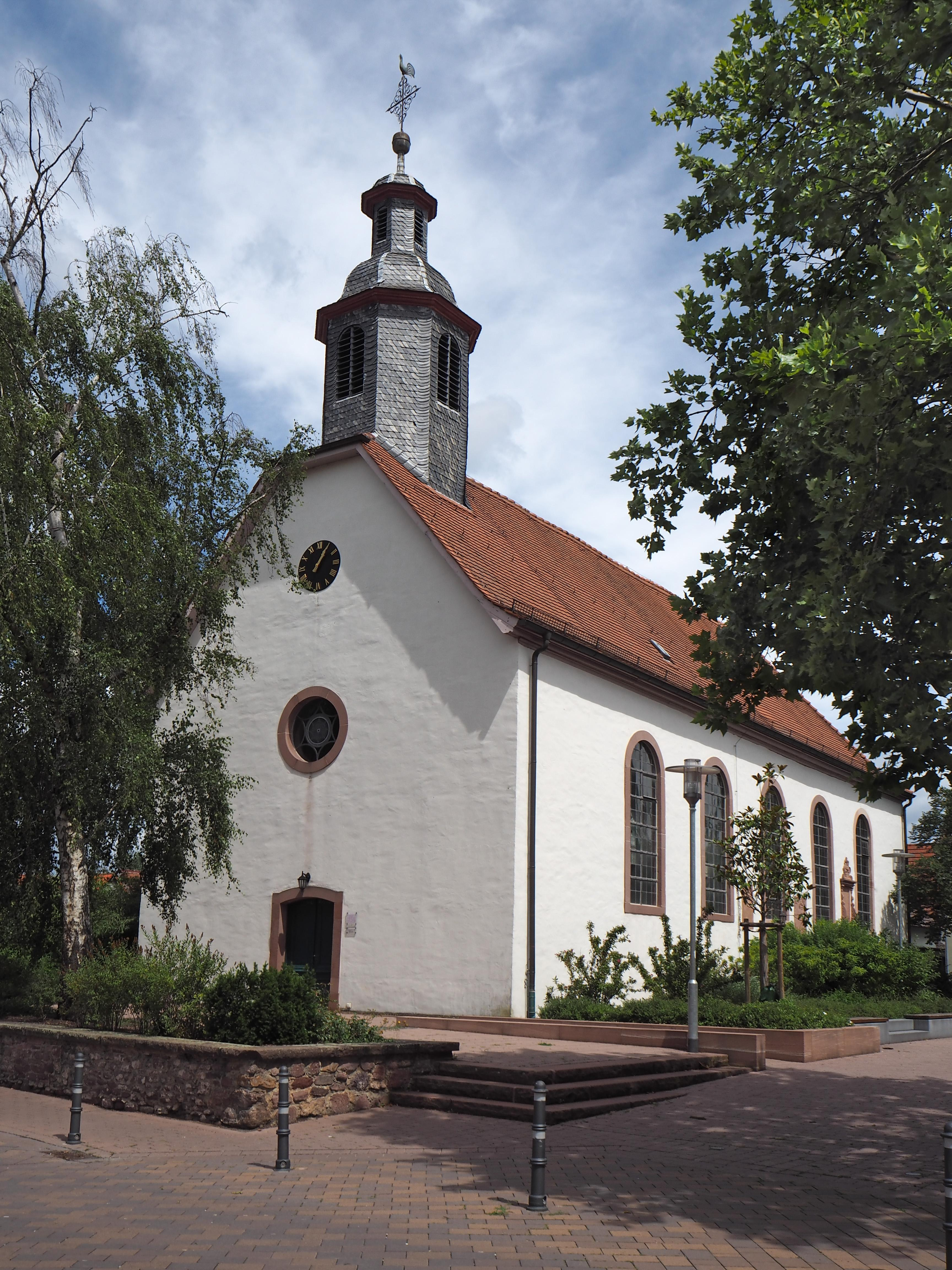 Mörfelden (Hessen, Evangelische Kirche Foto: Juli 2017